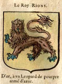 Le roi Rions, Hierome de Bara